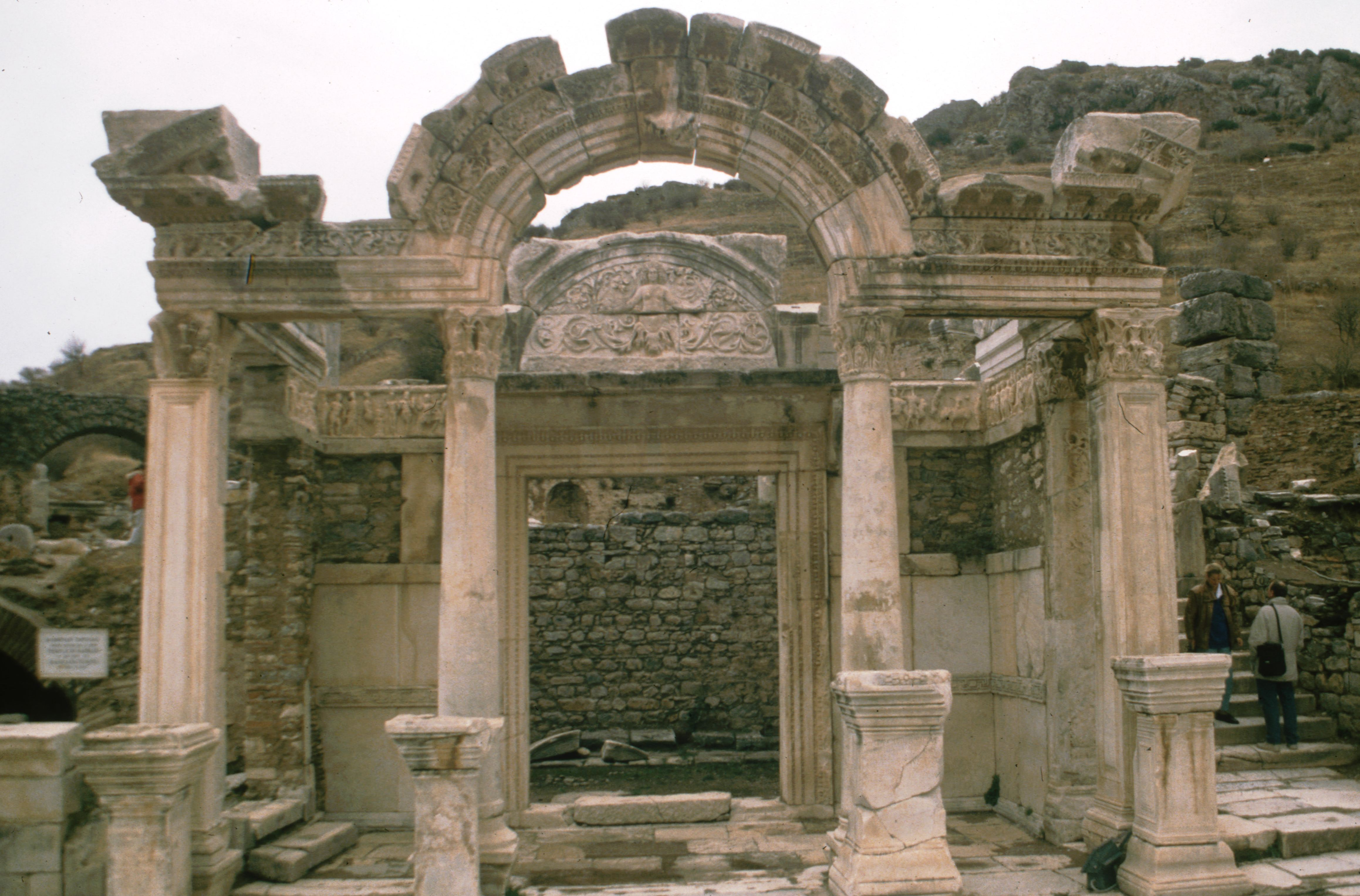 Ephesus, Hadriantempel